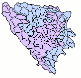 Bosniadivisions3